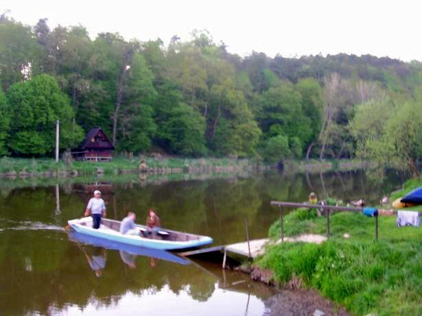 Přívoz Zlenice, řeka Sázava